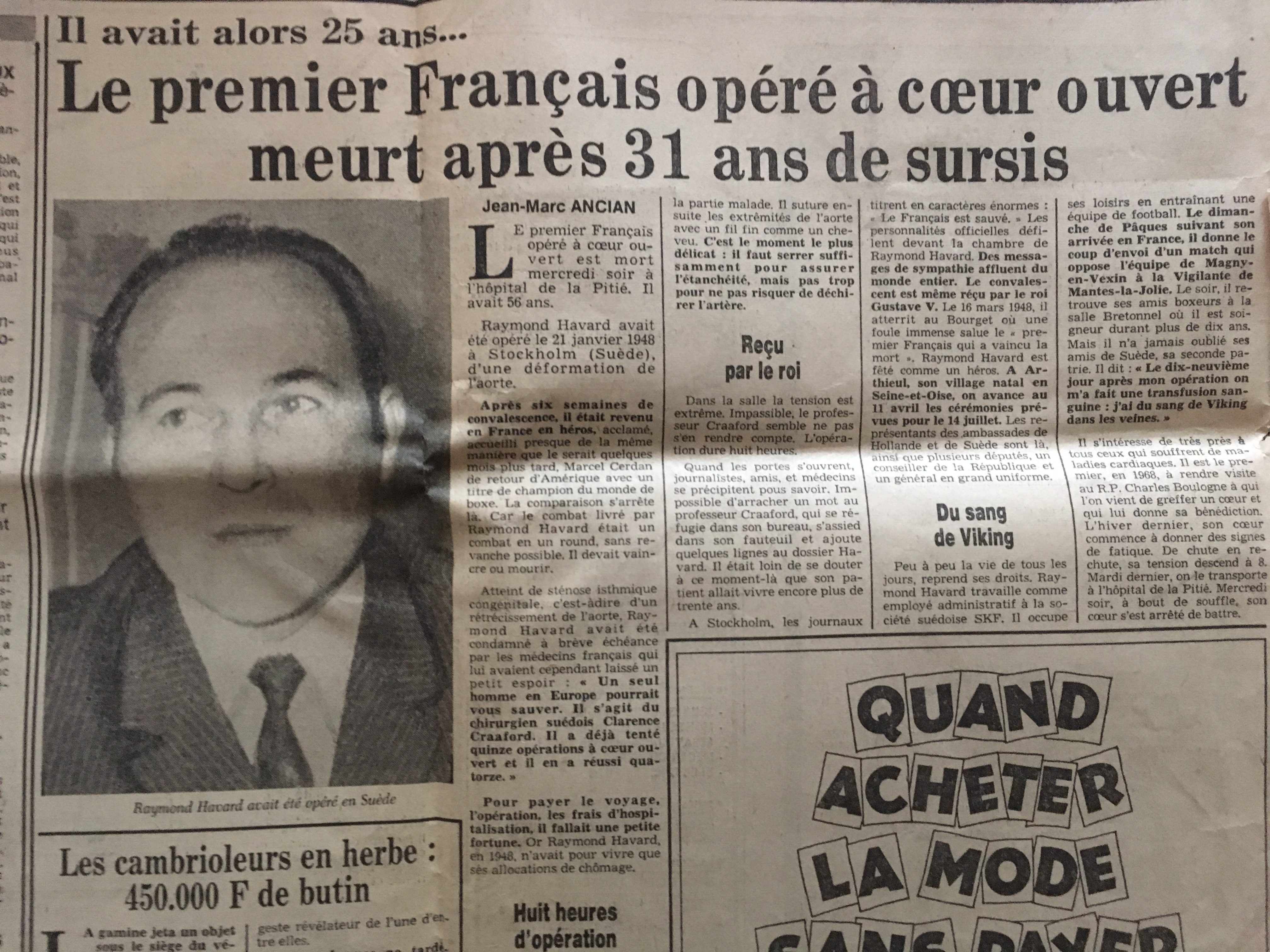 Raymond Havard est mort 31 après son opération